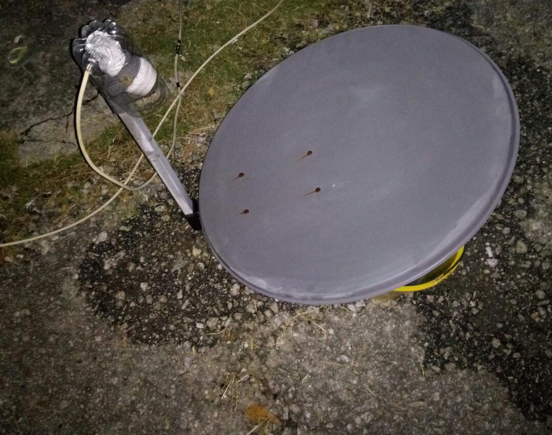 Piring Satelit terpakai boleh digunakan untuk menerima isyarat satelit tv percuma kearah barat daya Malaysia , didongakkan ke arah 85 darjah